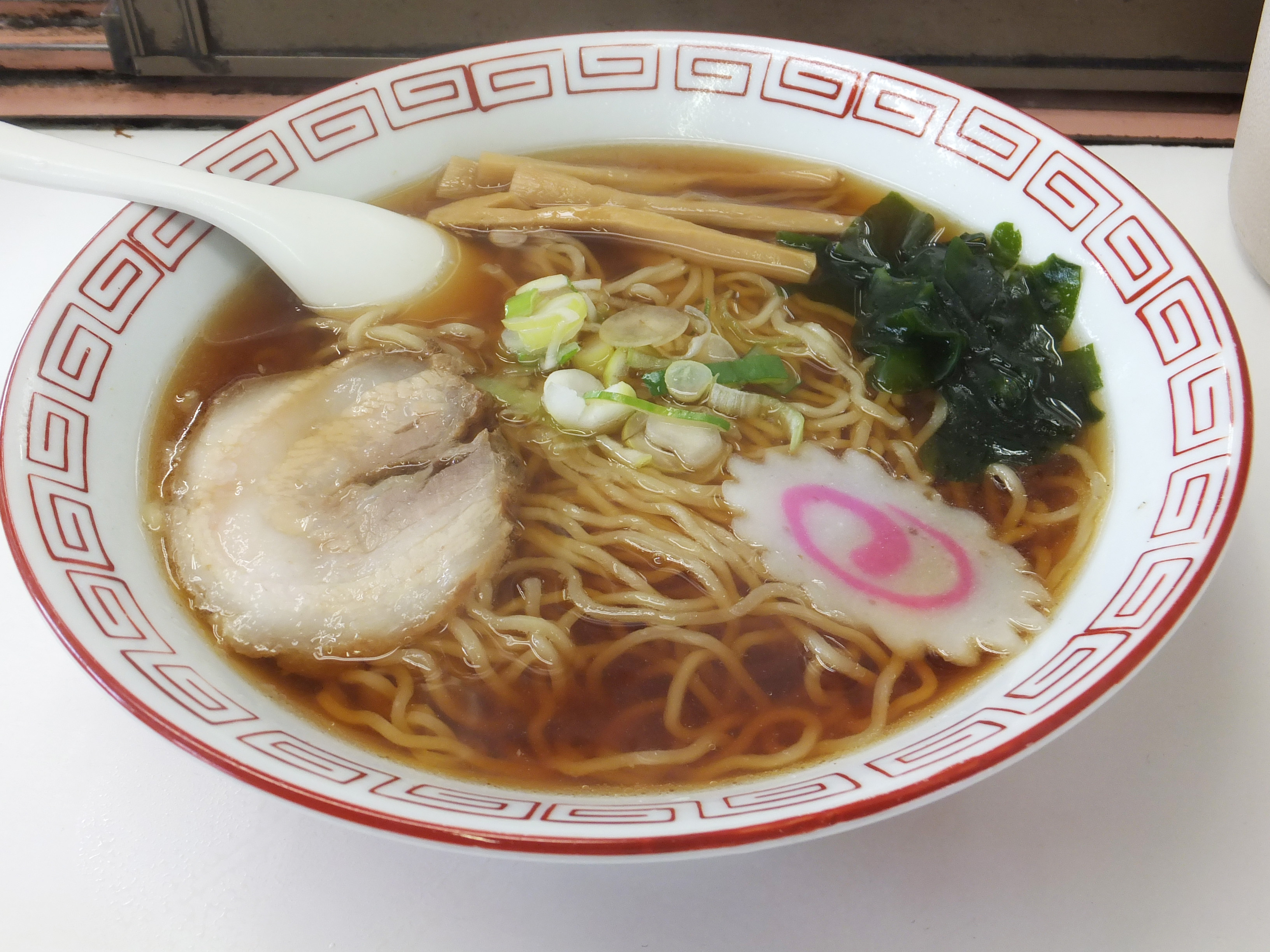 醤油ラーメン。春日部駅ホームのラーメン店「東武ラーメン」にて